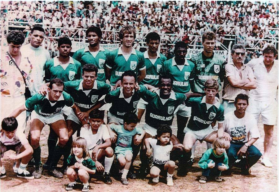 Amistoso entre Guarulhos e Santos em 1991